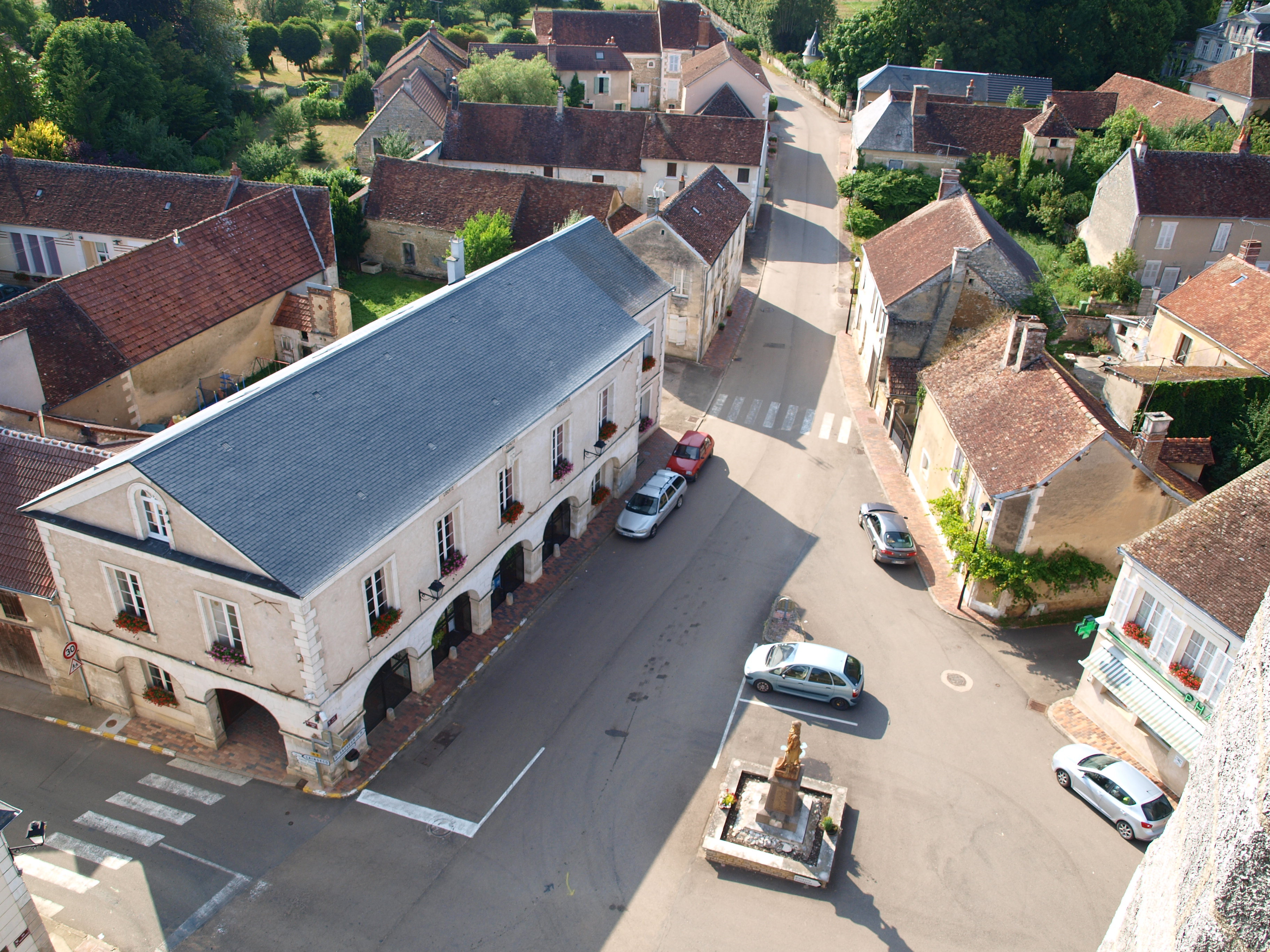 Thury (Yonne, France) ; place de l'église ; vue depuis la tour de l'église